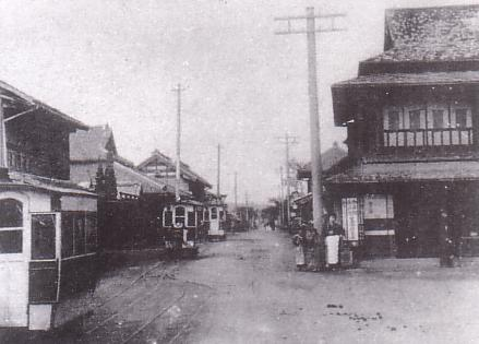 Abolished railway in Japan,Kasama Jinsha-kido(handcar railway).